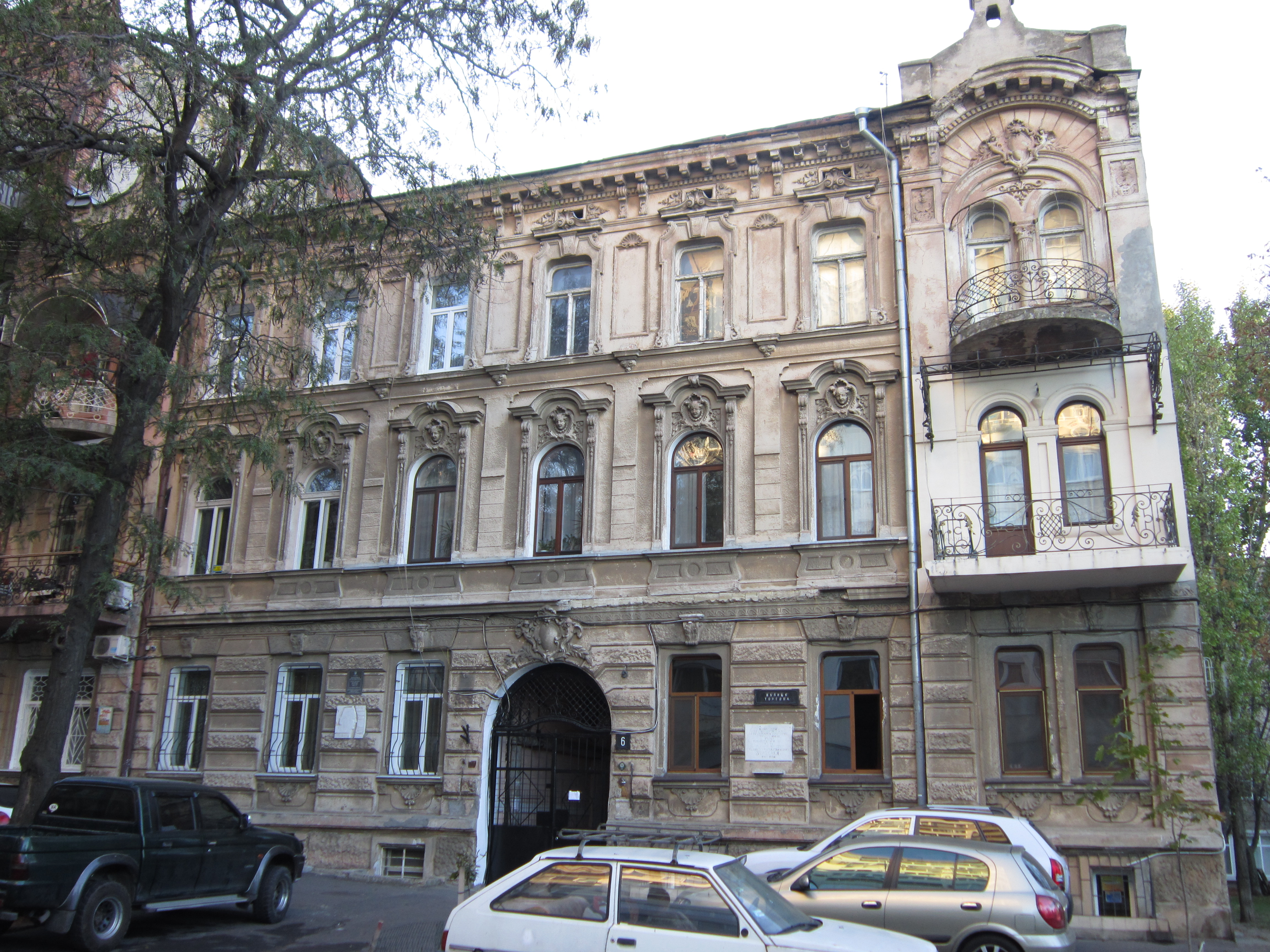 Будинок прибутковий Руссова, у якому жили:- Г.К. Боресков - вчений-хімік, академік;- Г.В. Костанді - математик, професор;- Н.А. Селявін - оперний співак, професор;- І.І. Воліковська - оперна співачка, н.а. УРСР;- С. Данченко - оперний співак, з.а. УРСР;- І. Невєров - поет, Одеса, Торгова вул., 6